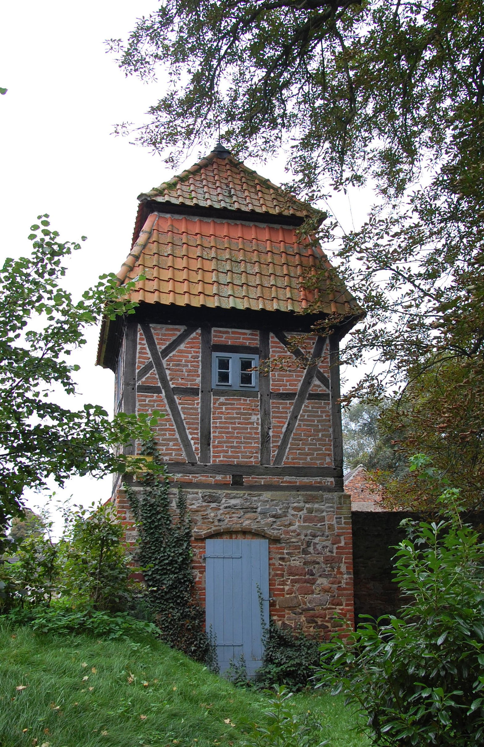 Turm beim Schloss Bodendorf